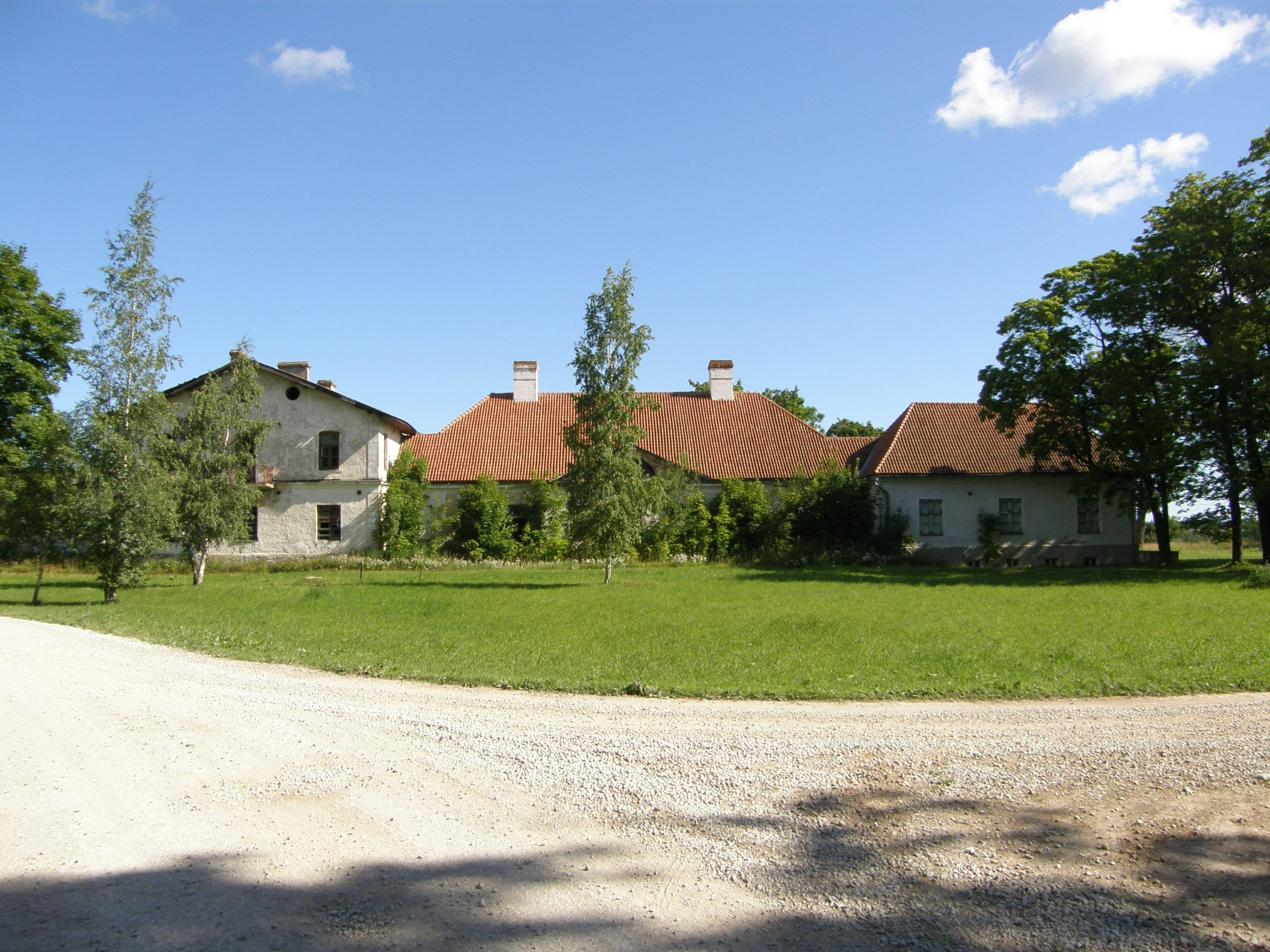 Kukruse mõisa peahoone 2007. aastal.